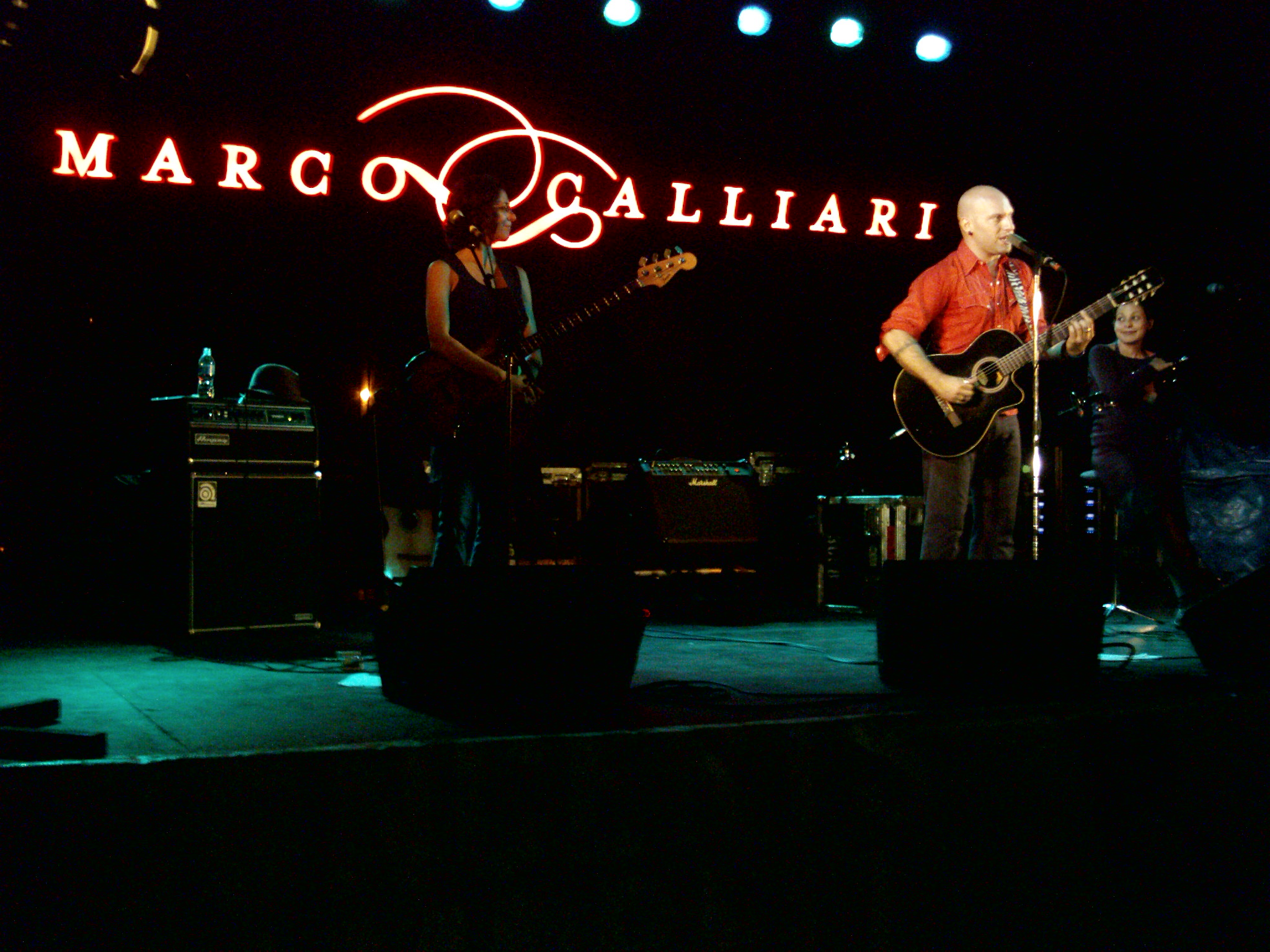 Marco Calliari en spectacle à Montréal